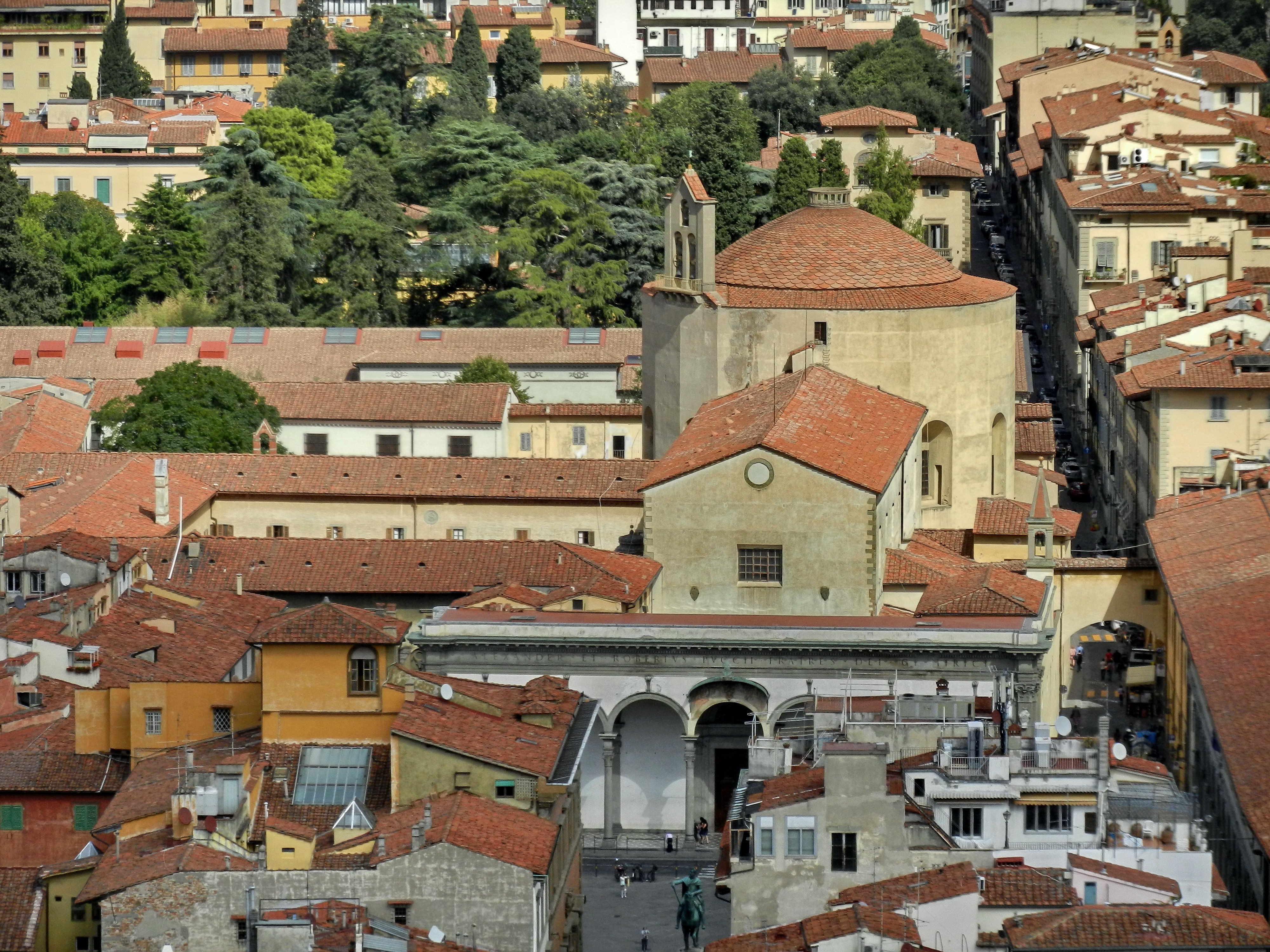 Флоренция